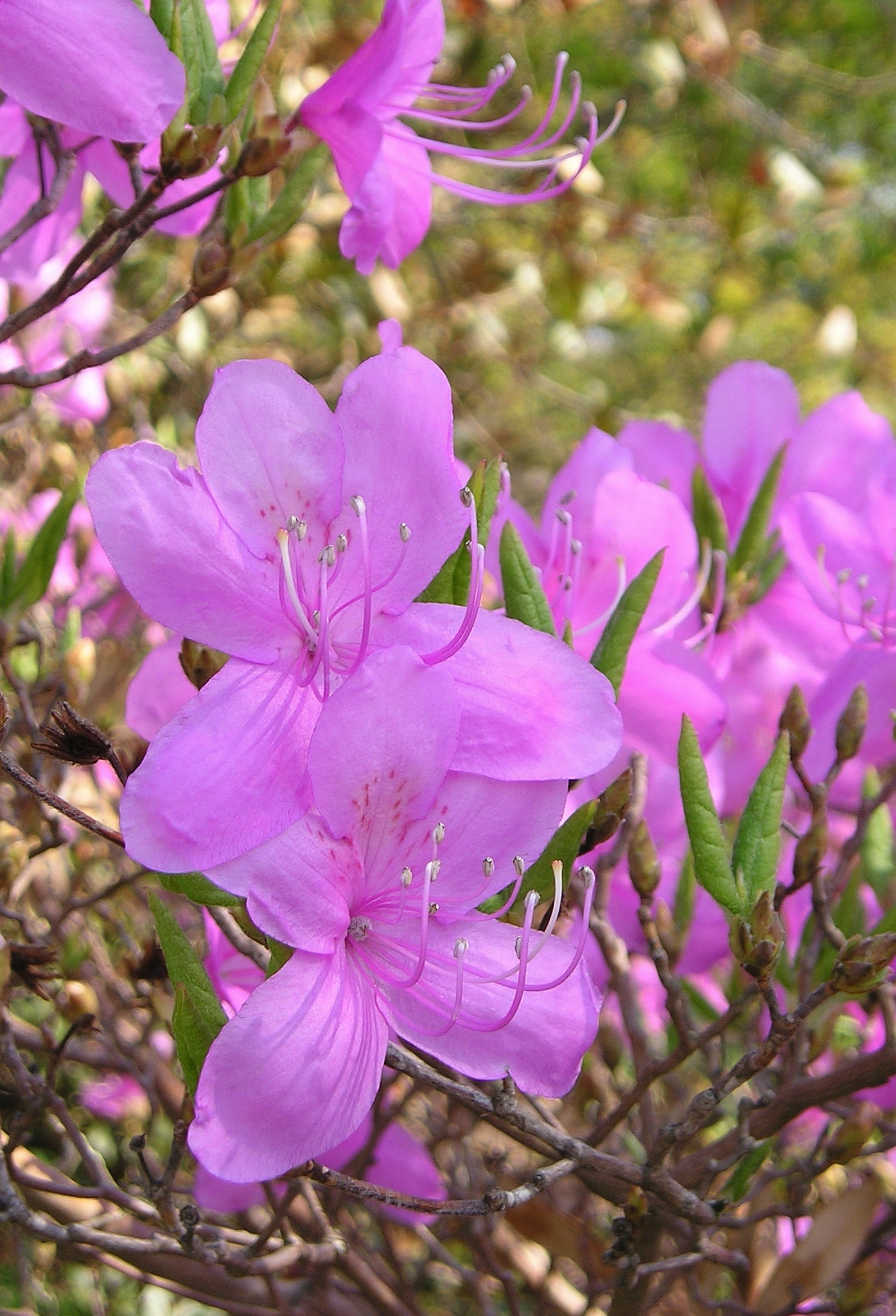 Netzadrige Azalee (Rhododendron farrerae) Botanischer Garten TU Dresden, April 2009